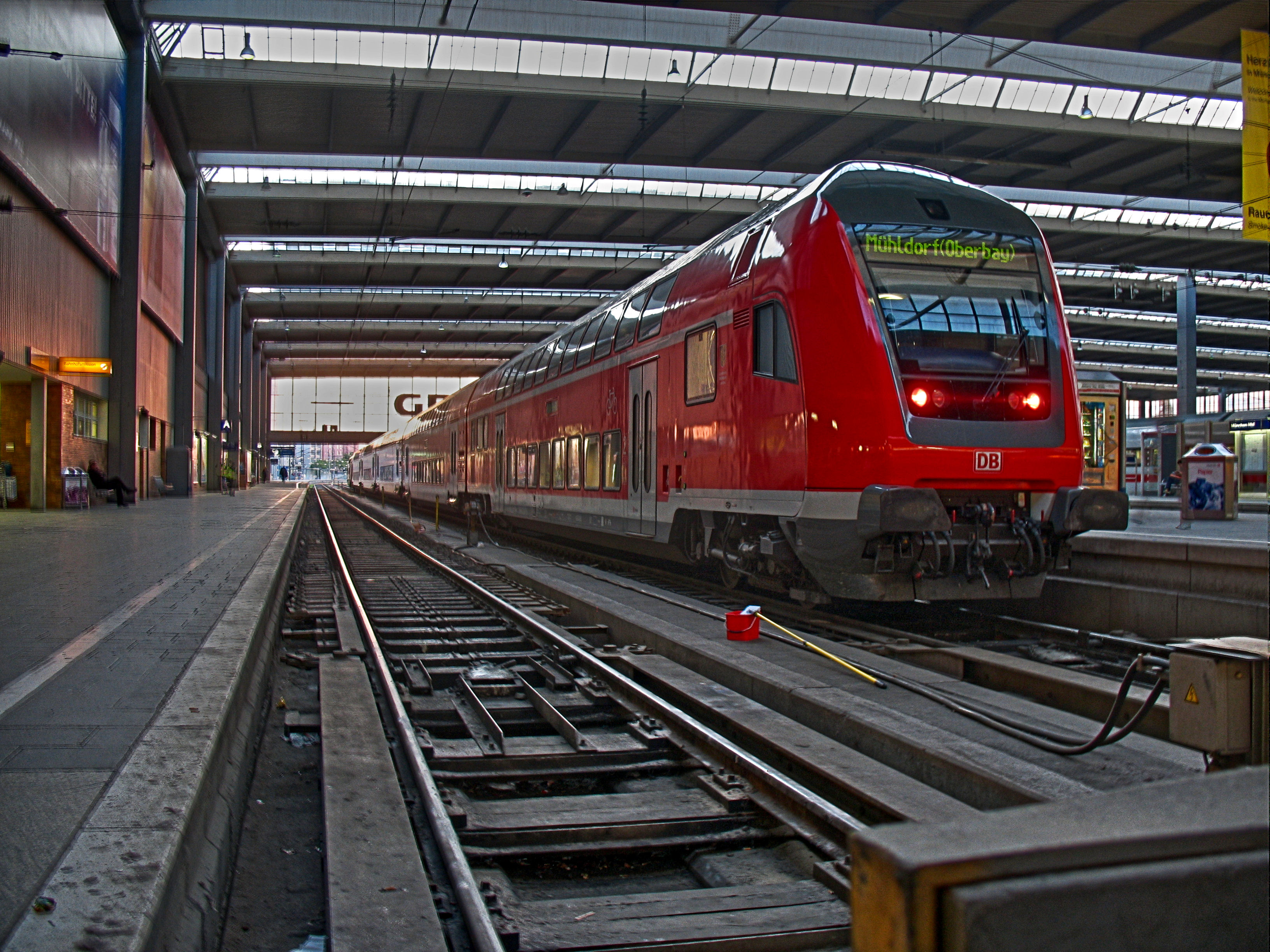 Ein Doppelstockzug der Deutschen Bahn steht auf einem Gleis im Hauptbahnhof der bayrischen Landeshauptstadt München.